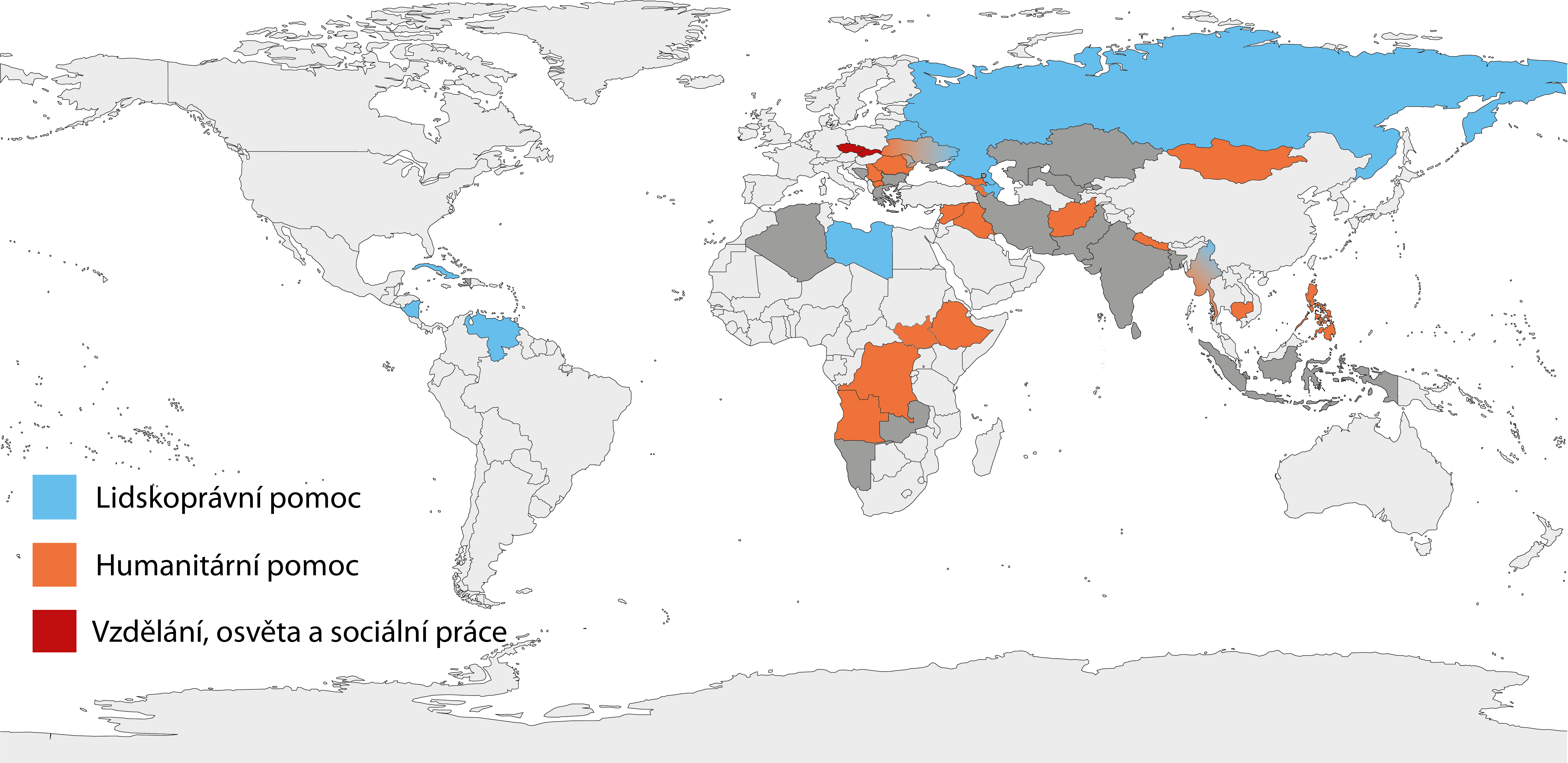 Mapa působení organizace Člověk v tísni v roce 2015